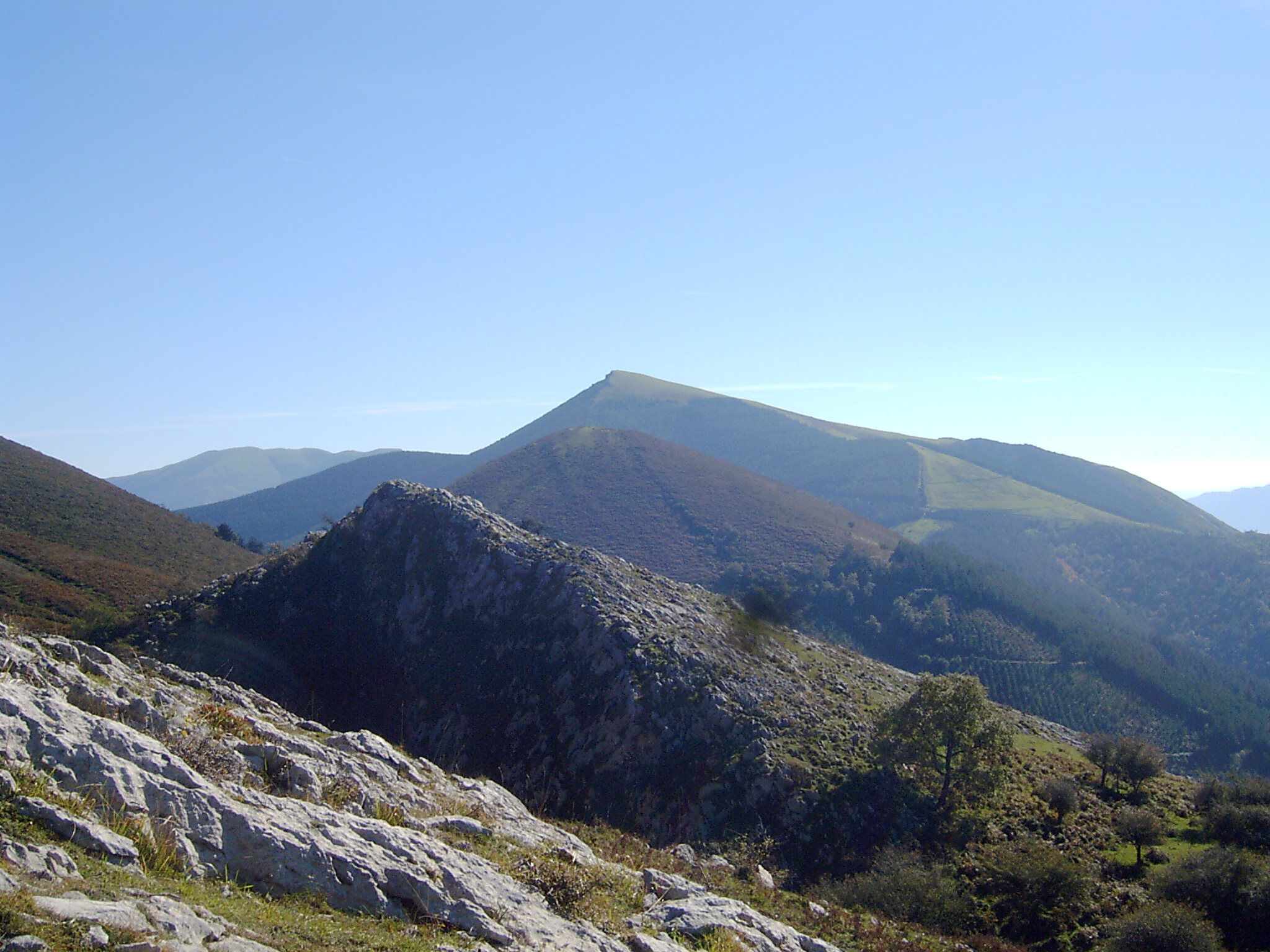 Trianoko mendien ikuspegia